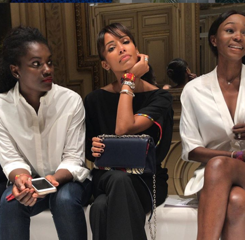 Sonia Rolland assistant à un défilé avec un modèle BHP.